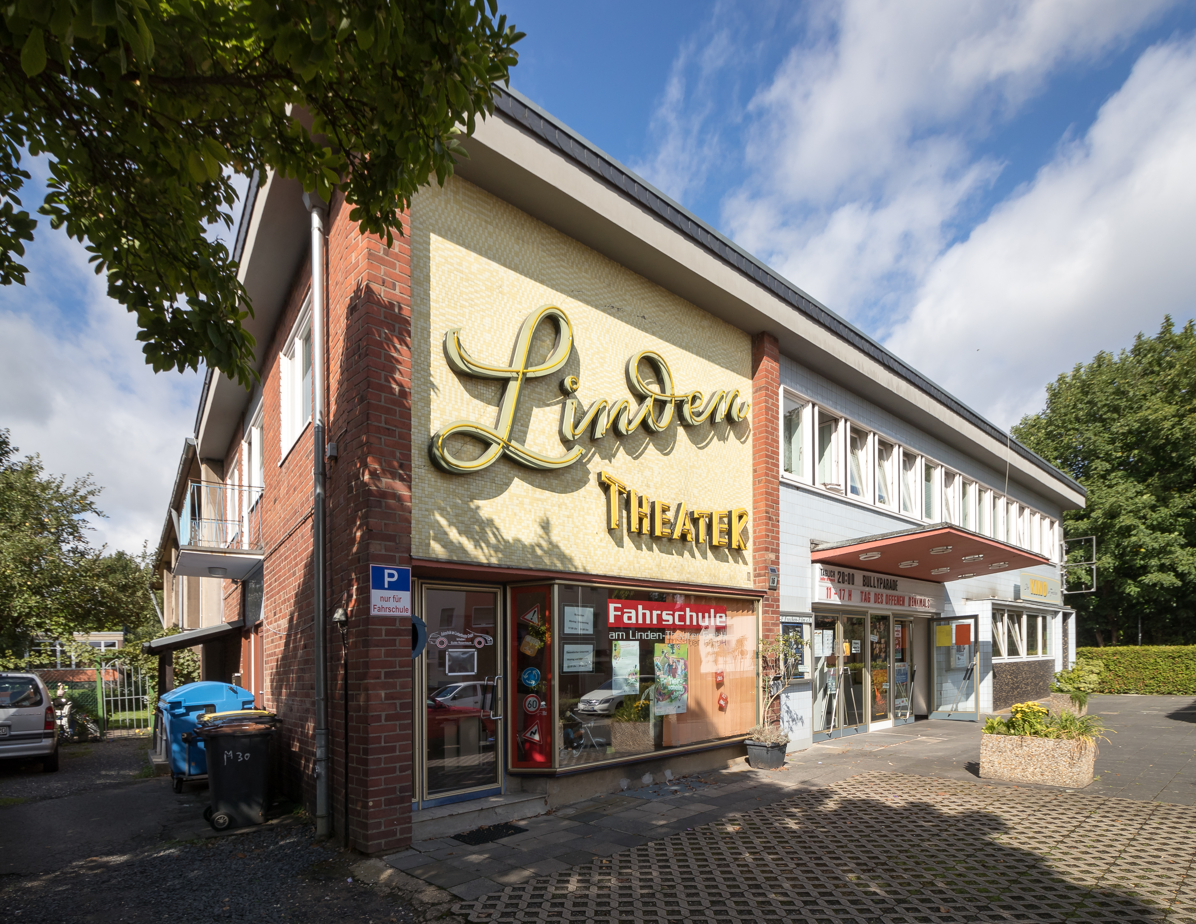 Kino Linden-Theater, Frechen This is a photograph of an architectural monument. 129